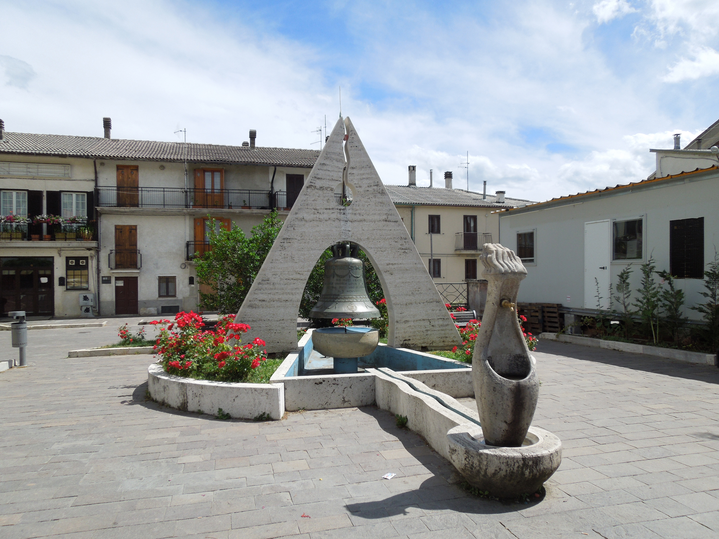 Piazza della chiesa di Campotosto di Campotosto in provincia dell'Aquila, esterno giorno, luglio 2016.